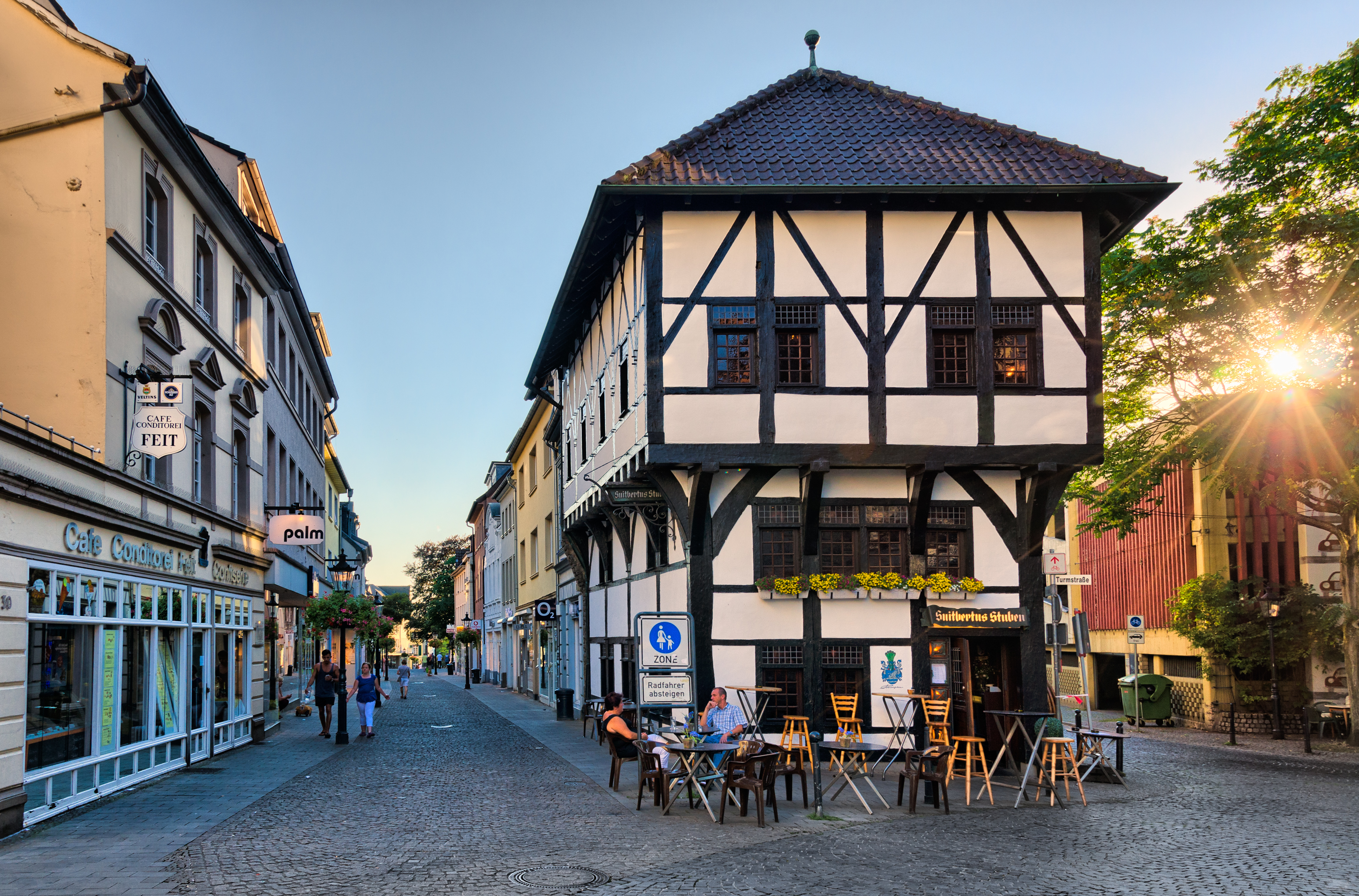 Fachwerkhaus "Roter Hahn" (heute Suitbertusstuben) in Ratingen